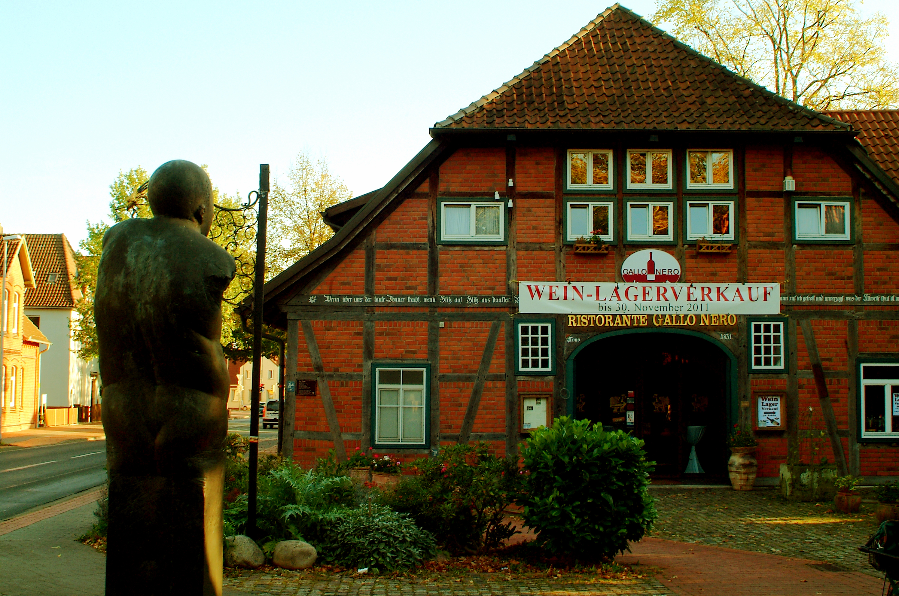 Der 1831 erbaute Fachwerkgebäude Hof Pieper am Groß-Buchholzer Kirchweg 72 in Hannover ist ein denkmalgeschützter Fachwerkbau. In dem Vierständerbau, ausweislich einer an der Fassade angebrachten Informationstafel auf dem ehemaligen Vollmeierhof Nummer 2, wurde der Räuber und Mörder Jasper Hanebuth geboren.Im Vordergrund: Großer Sockeltorso XX (1986/1987) von Waldemar Otto.